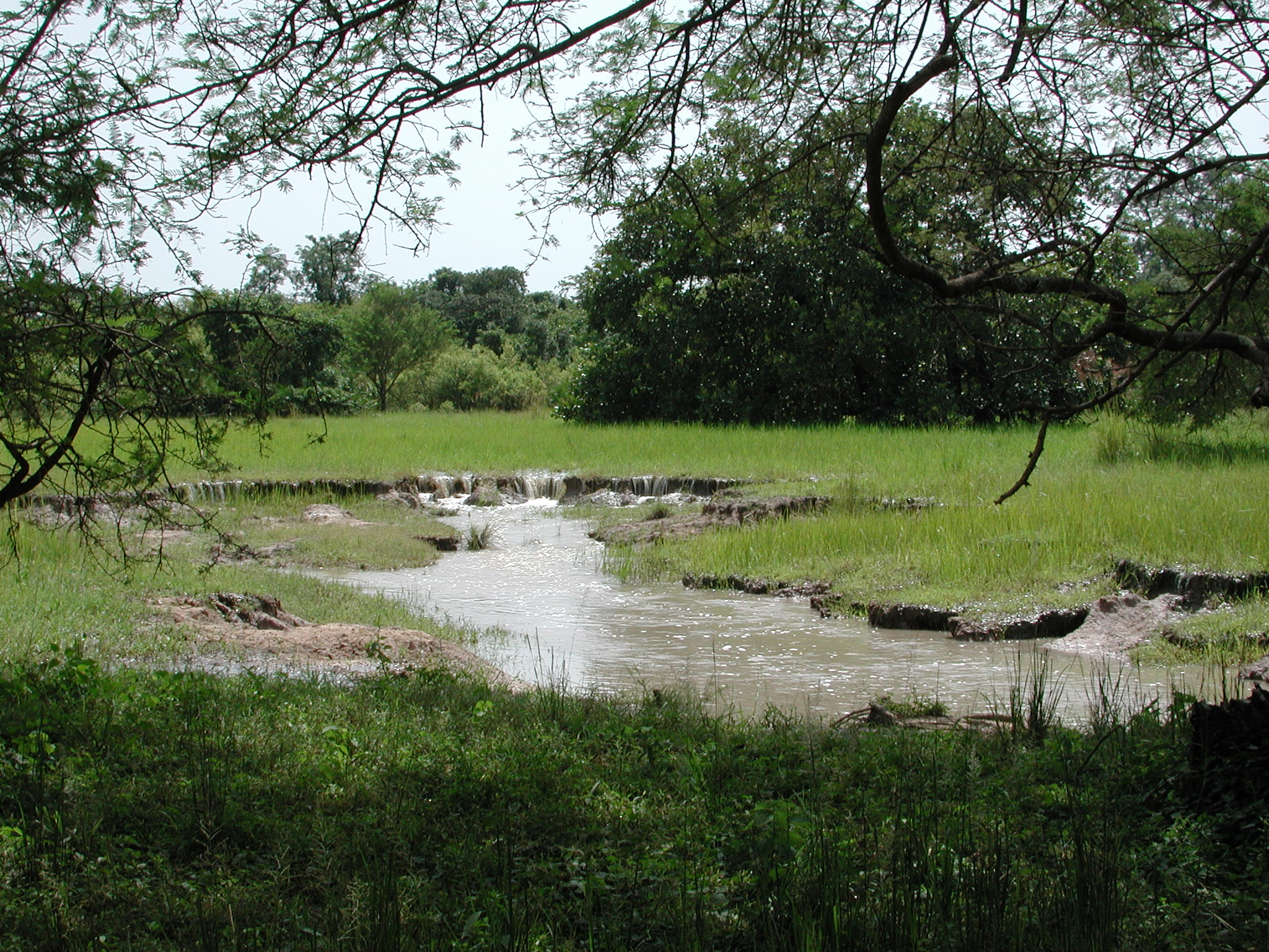 Forêt Classée de Niangoloko, Burkina Faso.